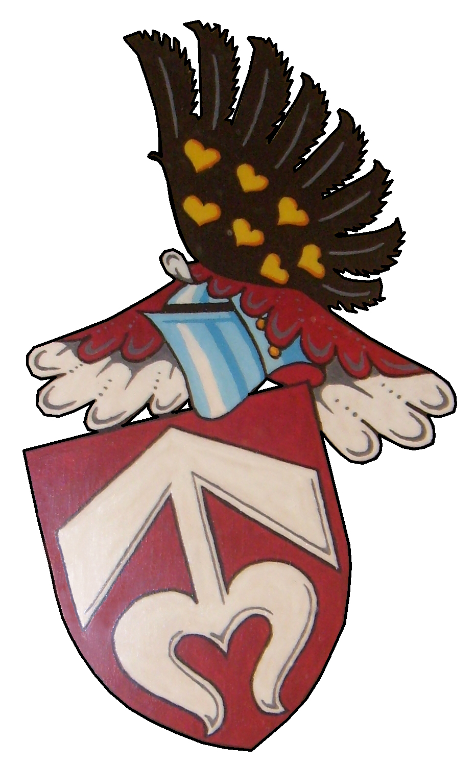 Erb pánů z Kravař